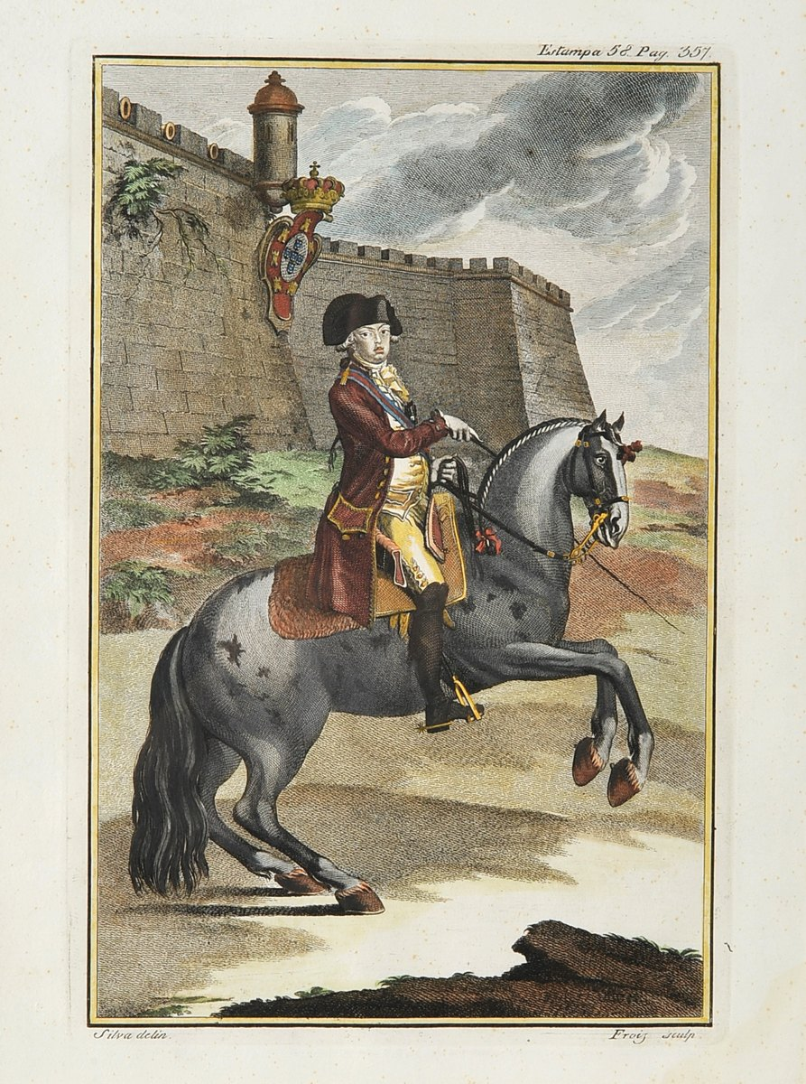 Luz da Liberal e Nobre Arte da Cavallaria, Estampa LVIII, p. 357 (1790)